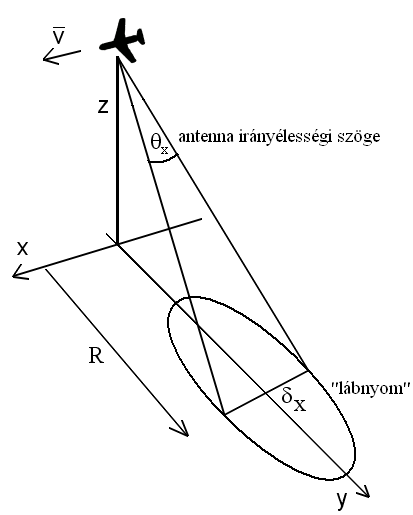 SLAR (oldalra néző légifedélzeti radar) elvének magyarázatára szolgáló képsorozat 1. tagja